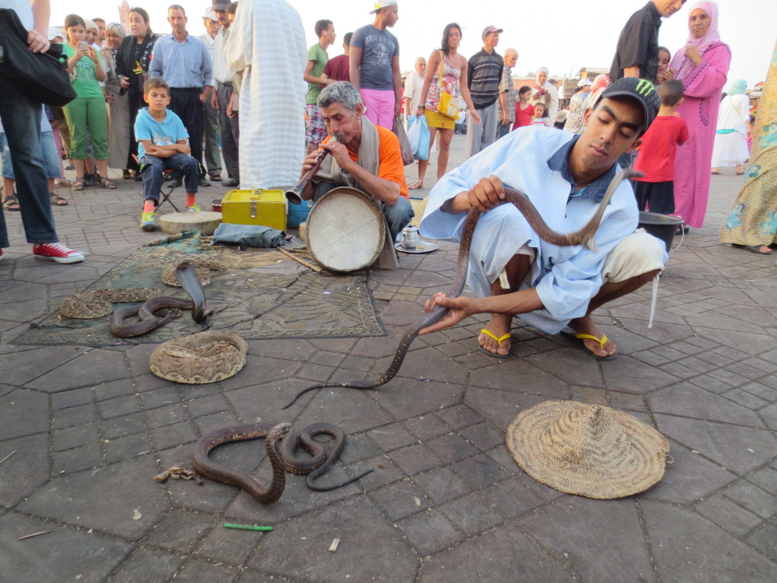 Jamaa El Fna